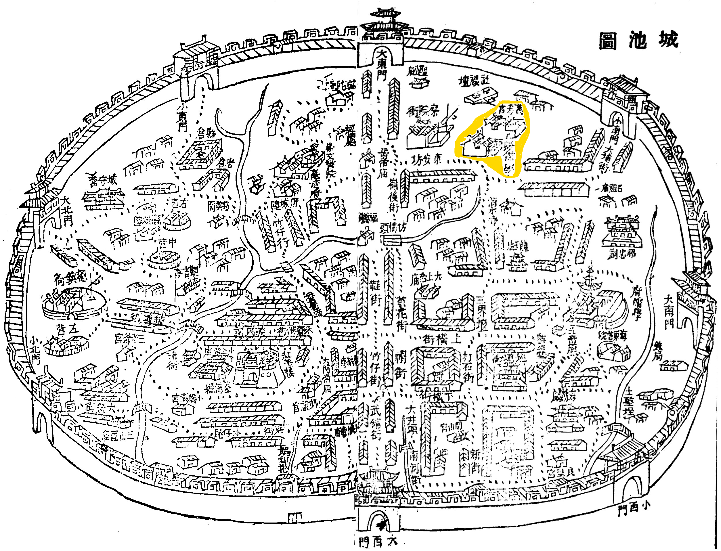 根據中文維基上此已無版權之圖的衍生作品